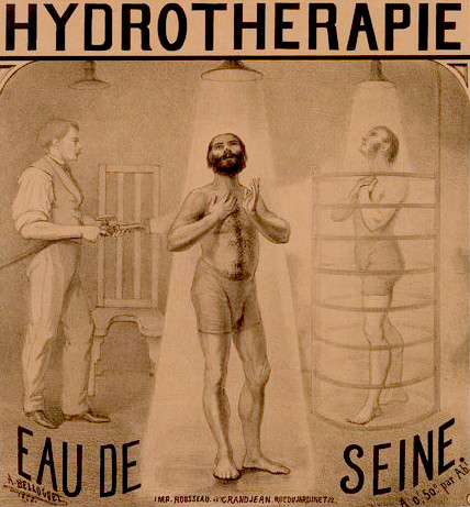 Détail d'une affiche publicitaire pour les Bains Soufflot, établissement d'hydrothérapie, bains russes et eau de Seine, 1860.